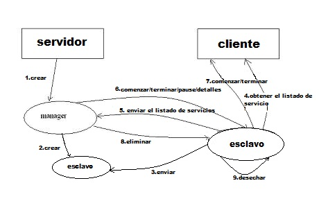 Monitoreo de servicios